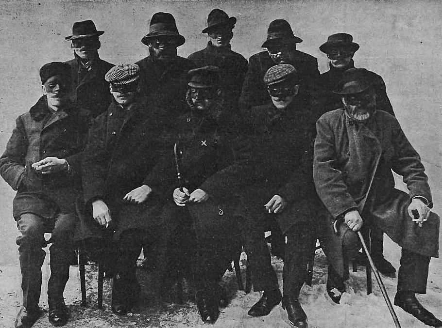 Uczestnicy odbica więźniów z Pawiaka 24 kwietnia 1906. Oznaczony x - "rotmistrz von Budberg".